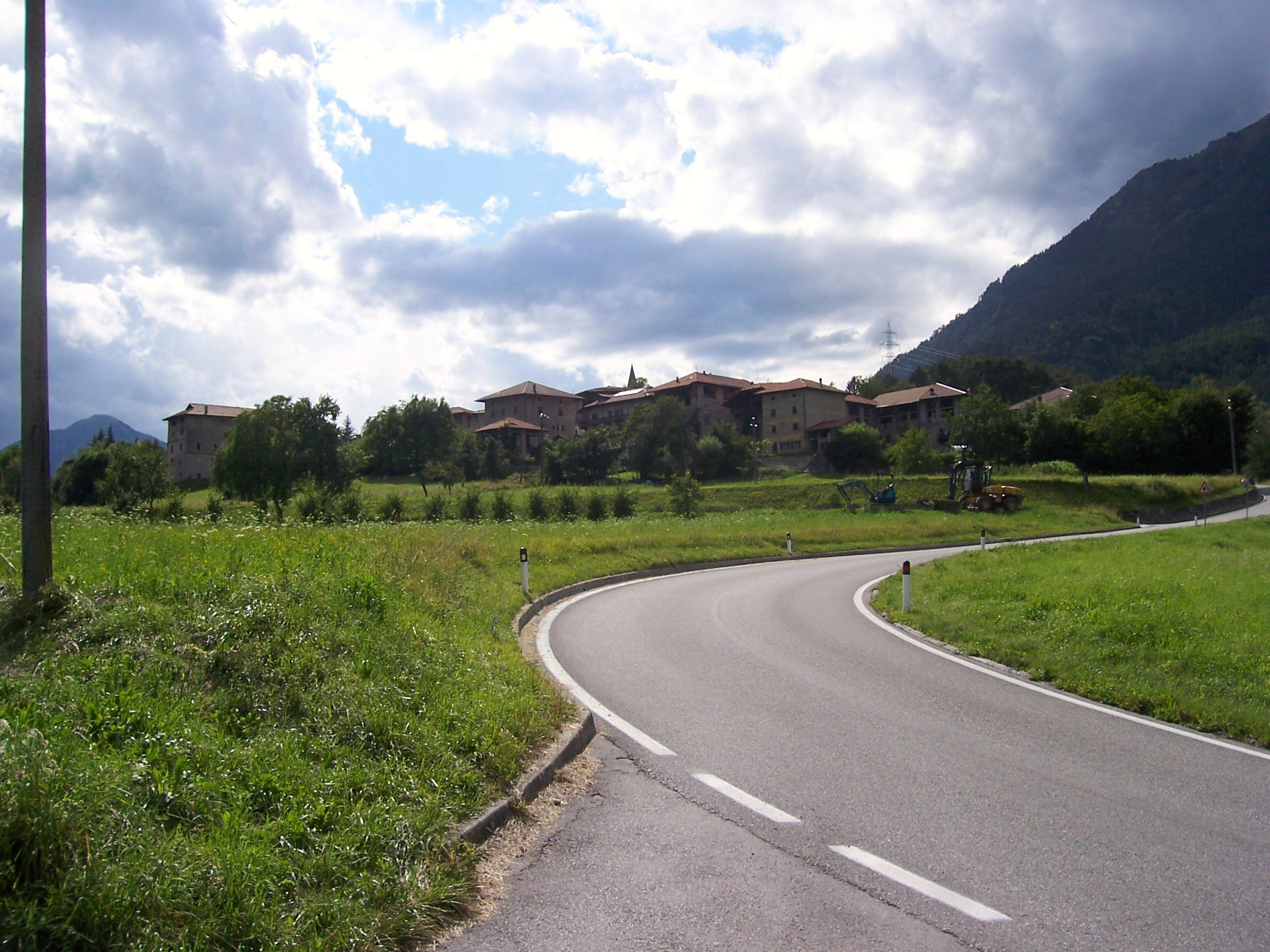 Sclemo di Trento